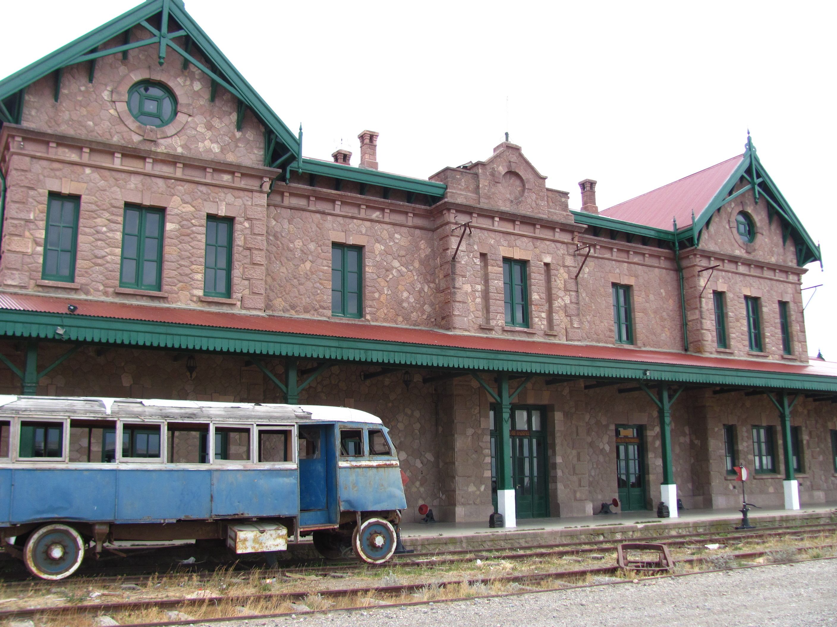 Detalle de los andenes de la estación de trenes de Puerto Deseado